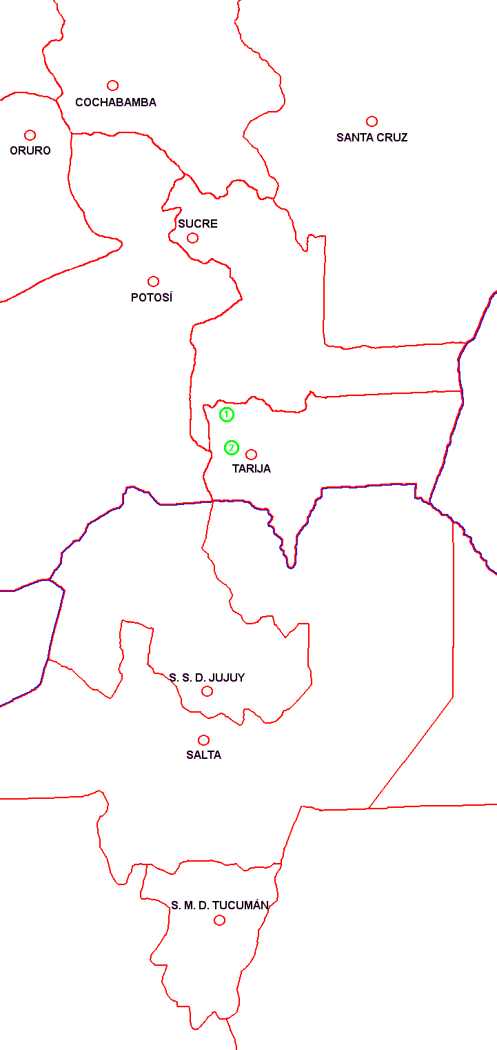 Rebutia iscayachensis - range map